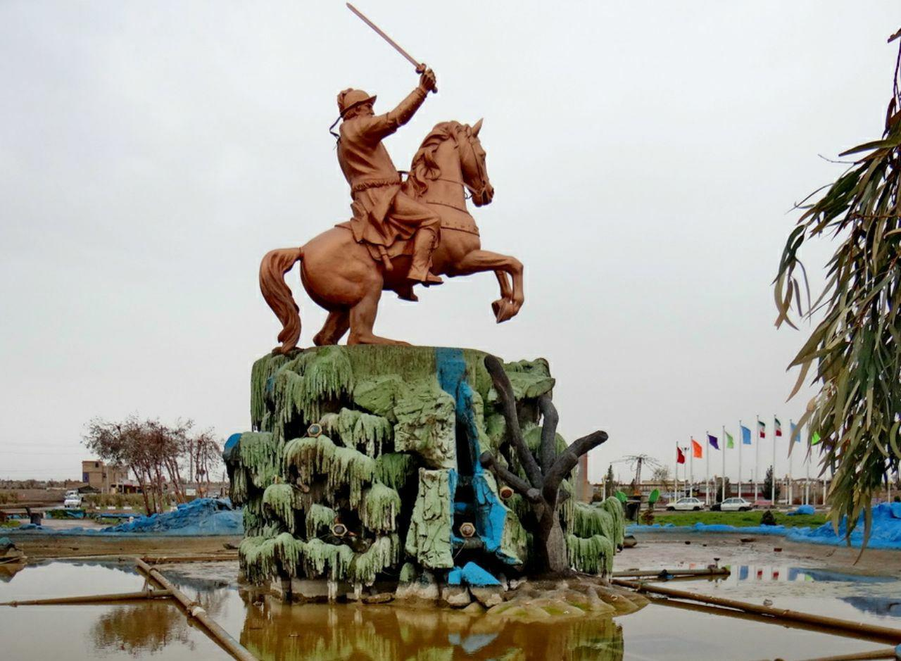 مجسمه یعقوب لیث در زابل